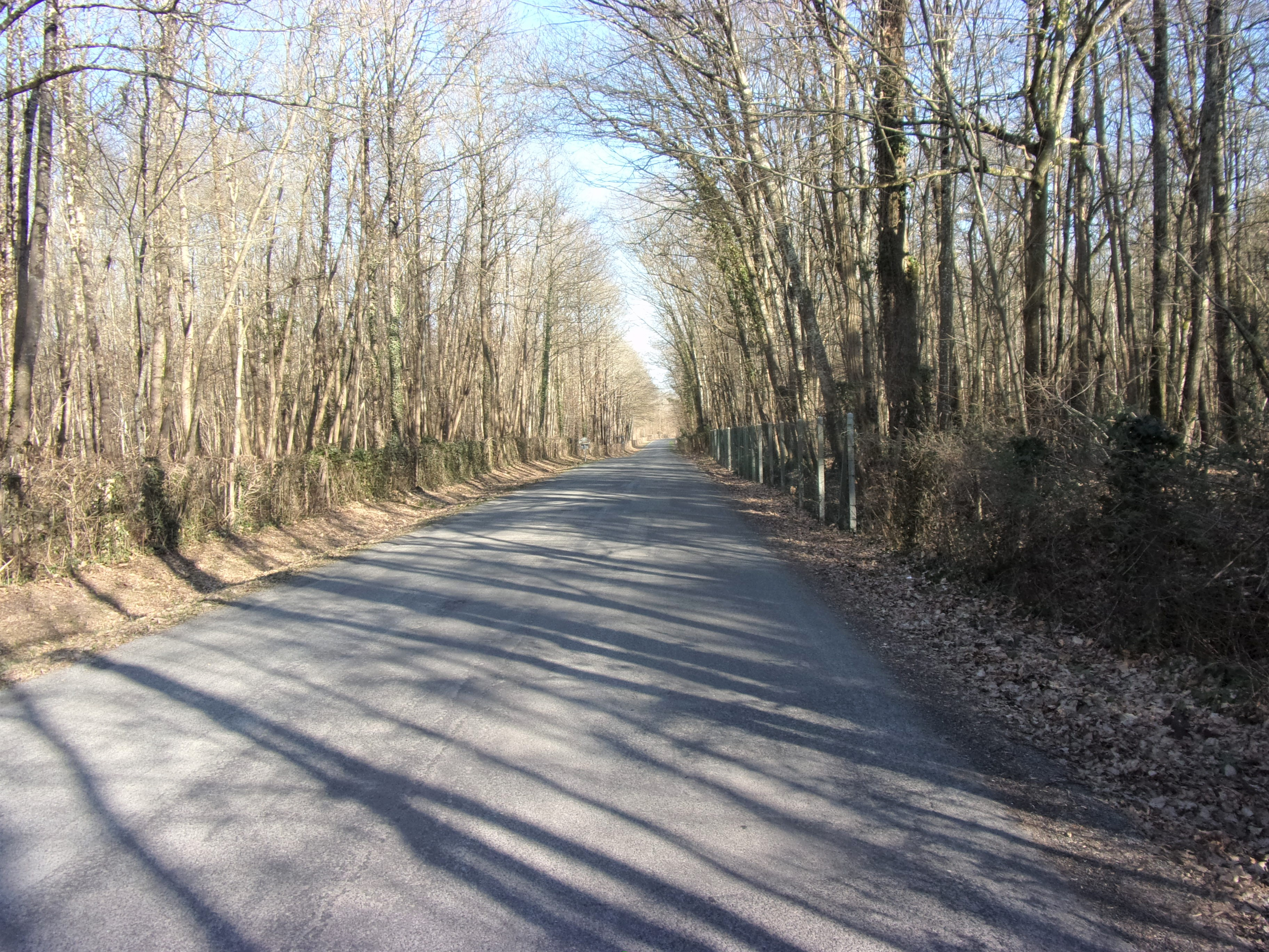 Ancien chemin aux bœufs à Veigné (voir médiévale ou antique)